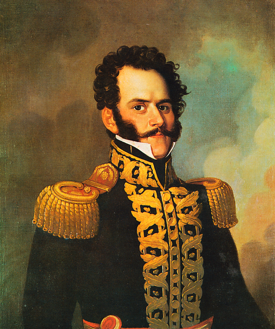 Retrato de Blas Cerdeña (1792-1854), general español que se estableció en Perú.